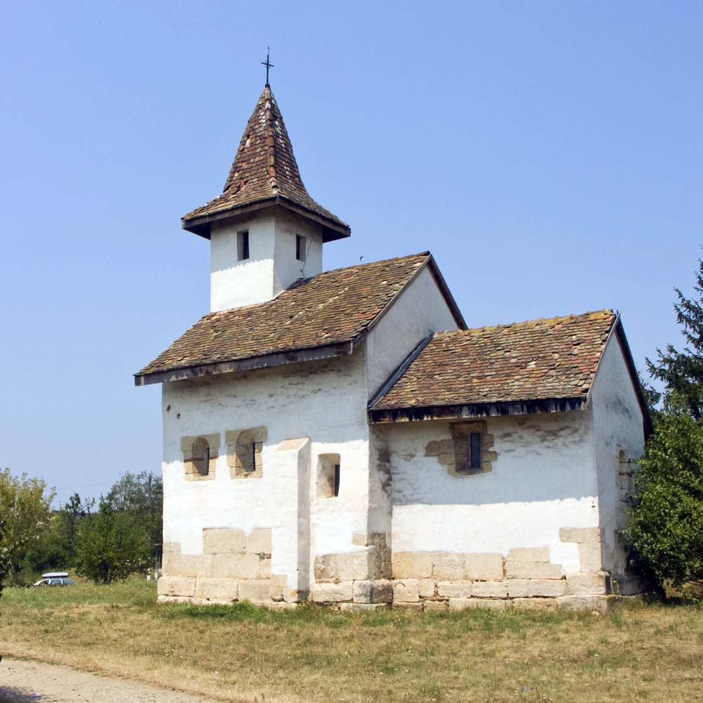 Church in Streisangeorgiu